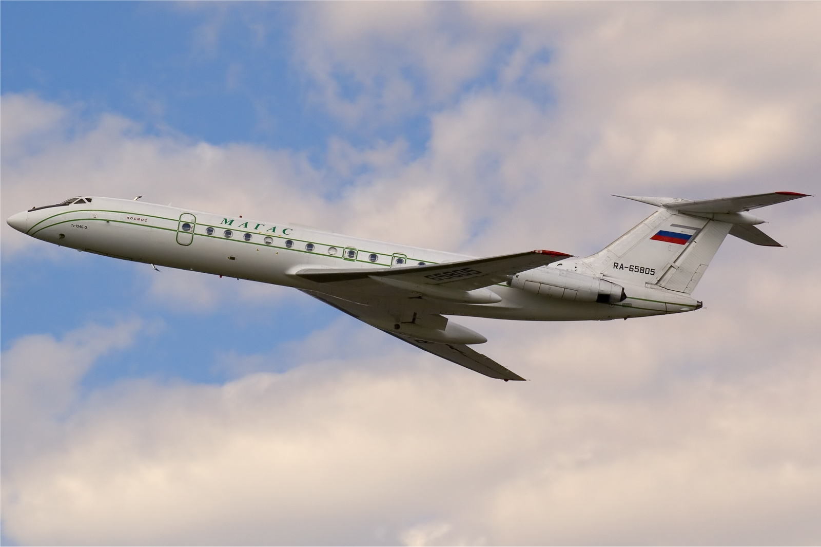 RA-65805, MAGAS Kosmos Tupolev Tu-134, Vnukovo International Airport